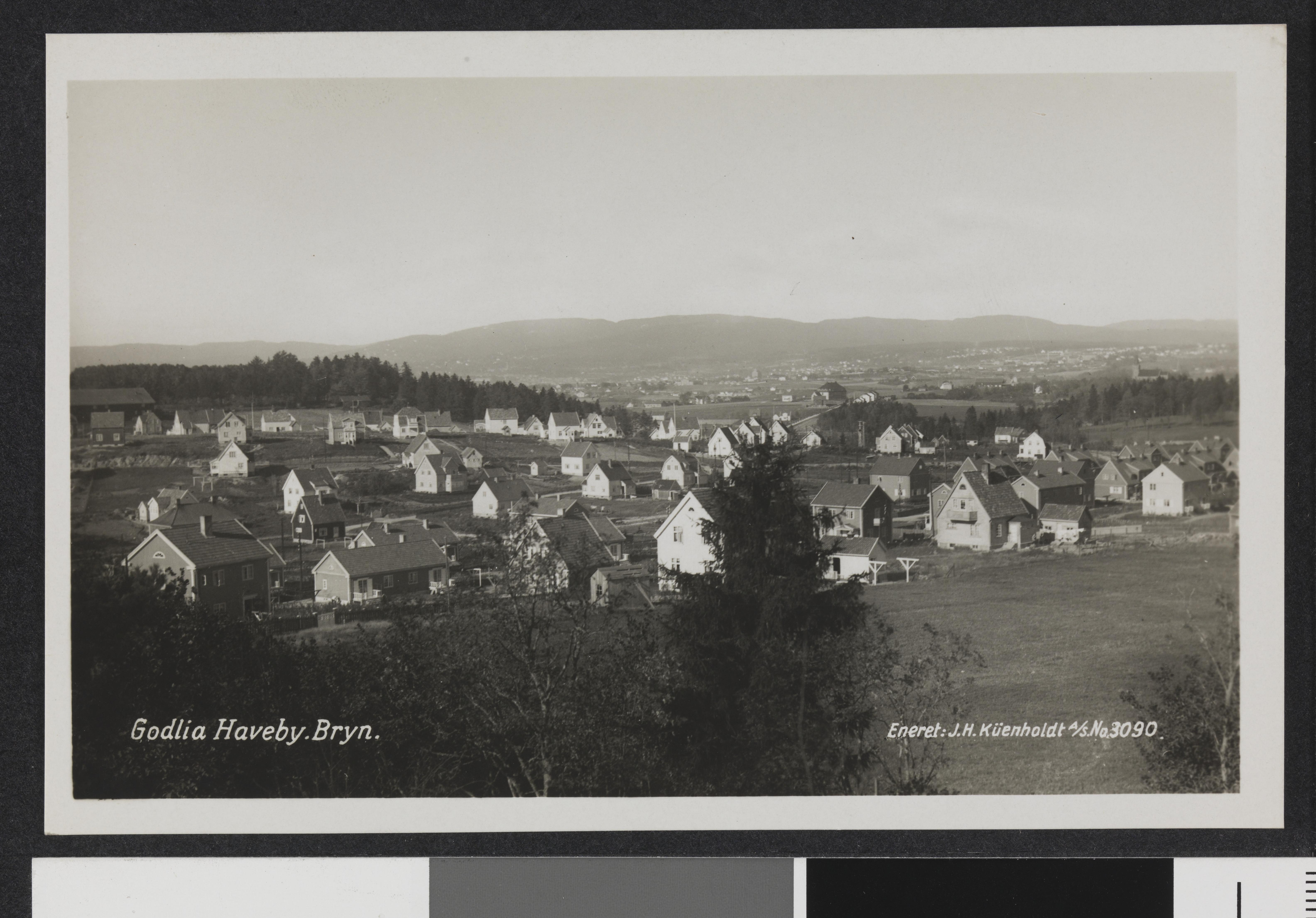 Bildet er hentet fra Nasjonalbibliotekets bildesamling Godlia,Østensjø, Oslo, Oslo